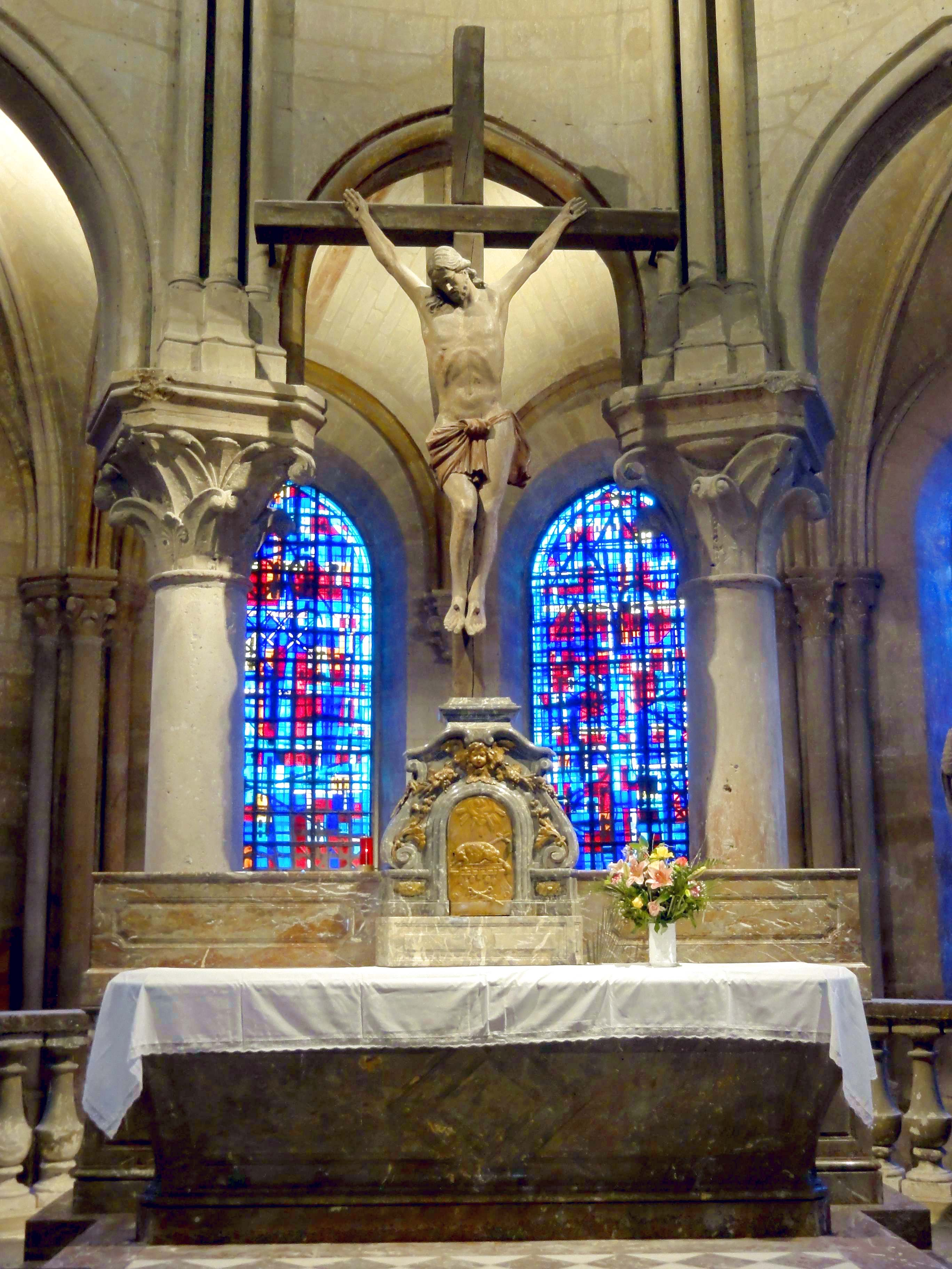 Mobilier de l'église - voir titre.